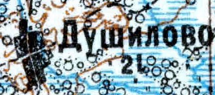 Топографическая карта Ленинградской области, квадрат VIc-28 (Луга), деревни Душилово